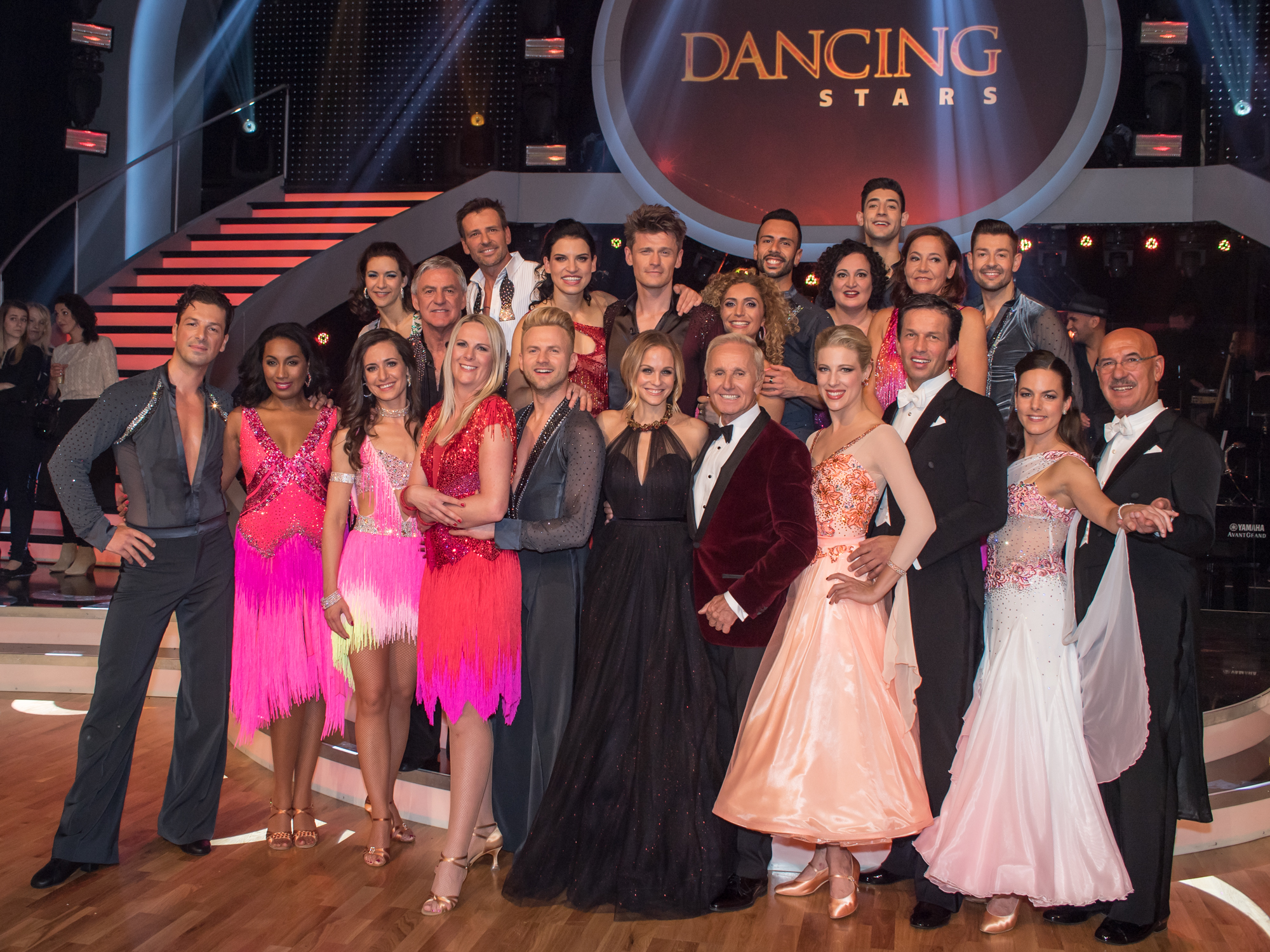 ORF Dancing Stars am 31. März 2017. Bild zeigt Gruppenbild der Teilnehmer.